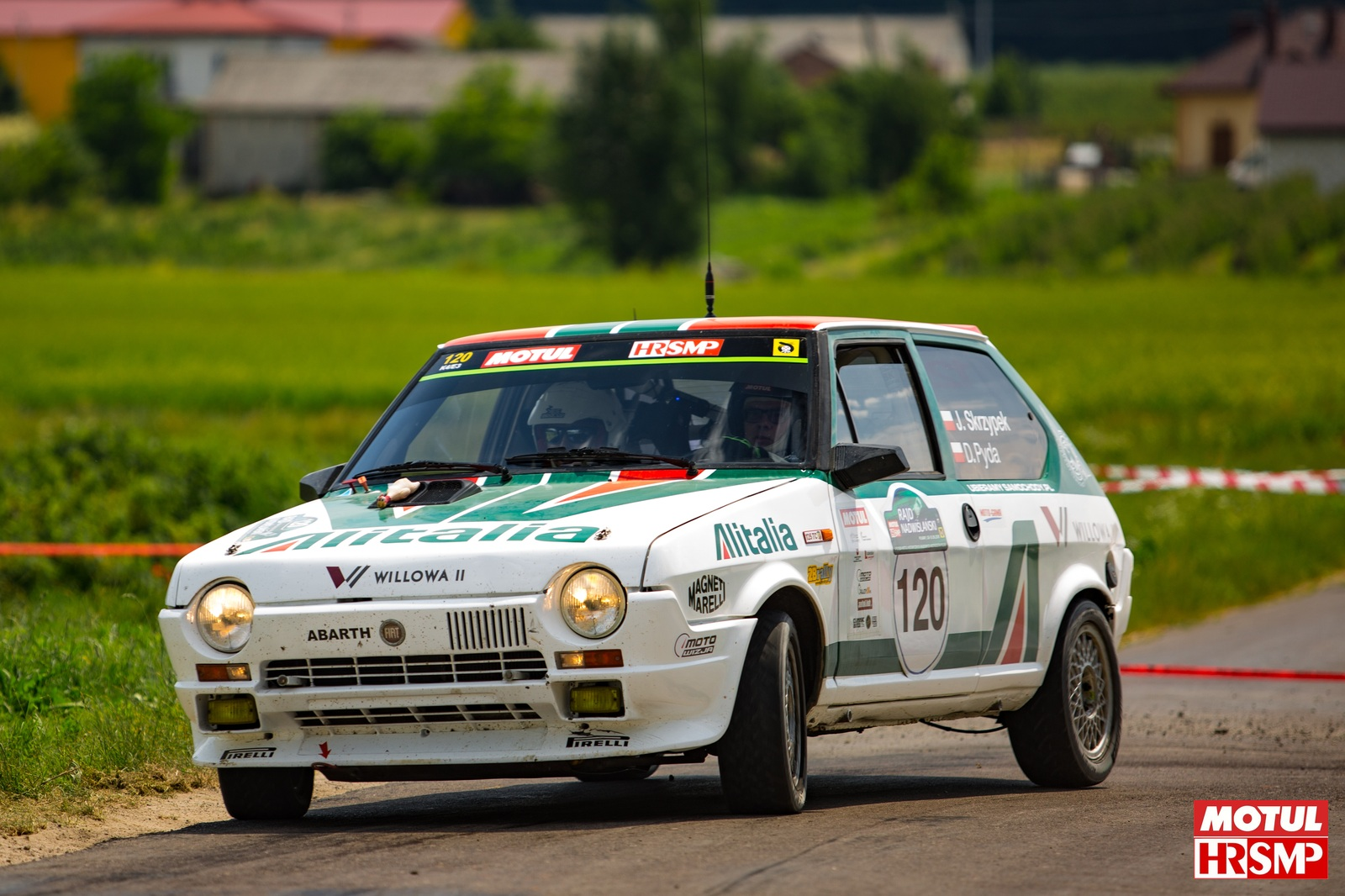 Jarzy Skrzypek - Dariusz Pyda Fiat Rirmo Abartrh Rajd Nadwislanski HRSMP 2018